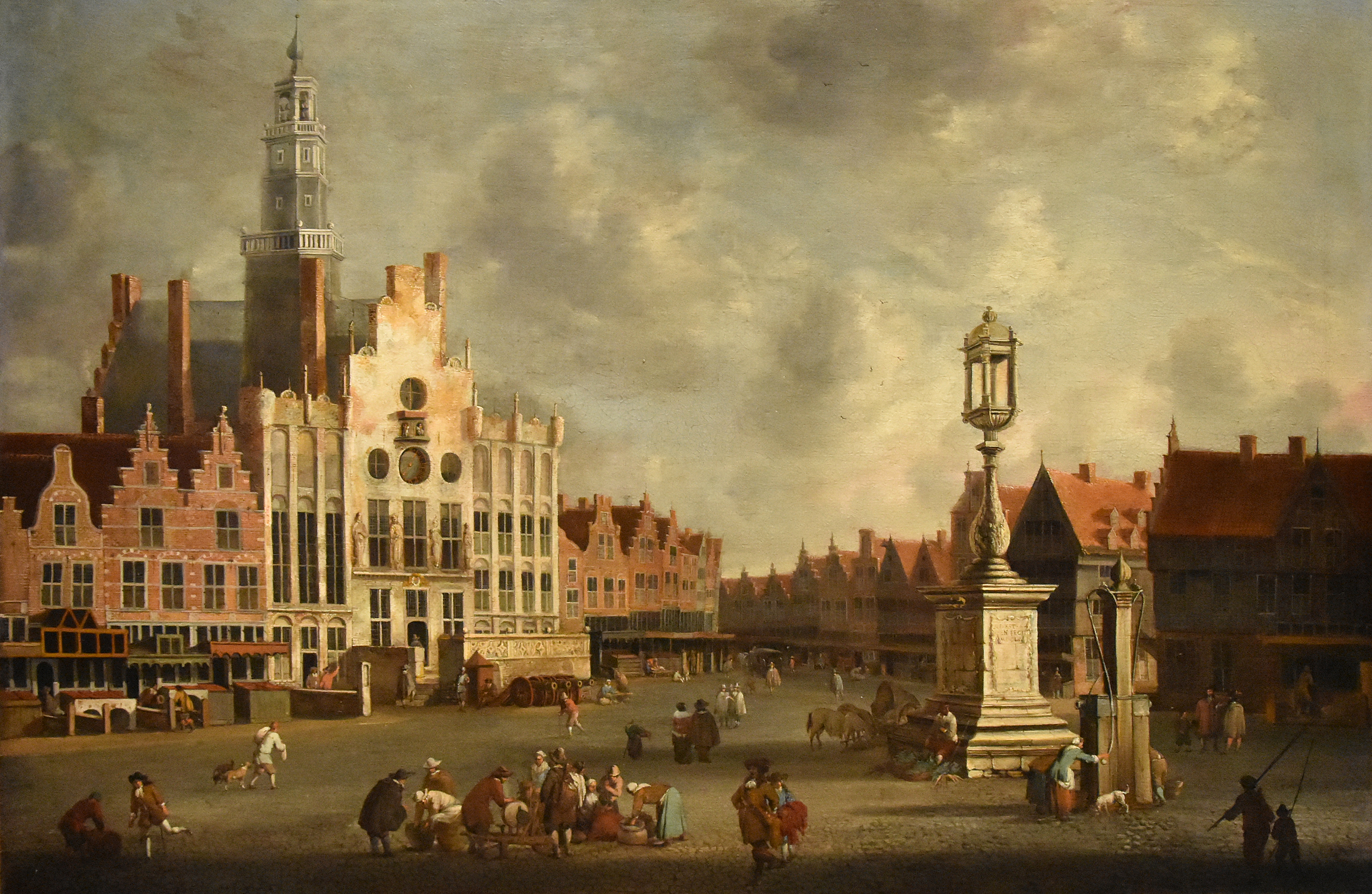 Jan Abrahamsz. van Beerstraten (1622-1666) De markt te Den Bosch (1665) - Noordbrabants Museum 's-Hertogenbosch